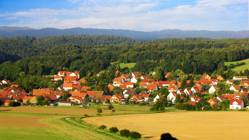 Waake mit Harzblick